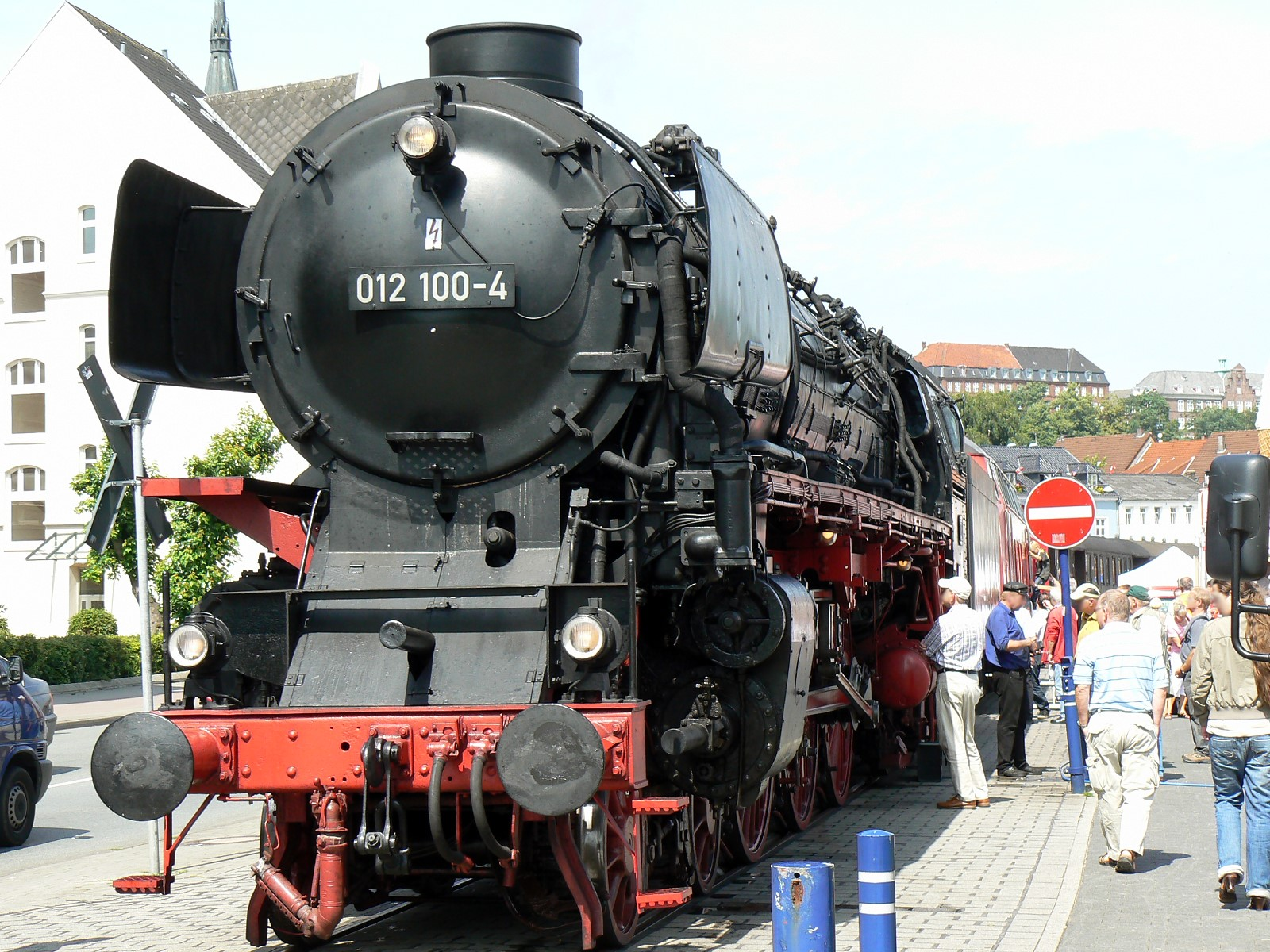 Dampflokomotive 012 100-4 auf dem Flensburger Dampfrundum 2007 (Einheits-Schnellzuglokomotive DRG Baureihe 01.10)